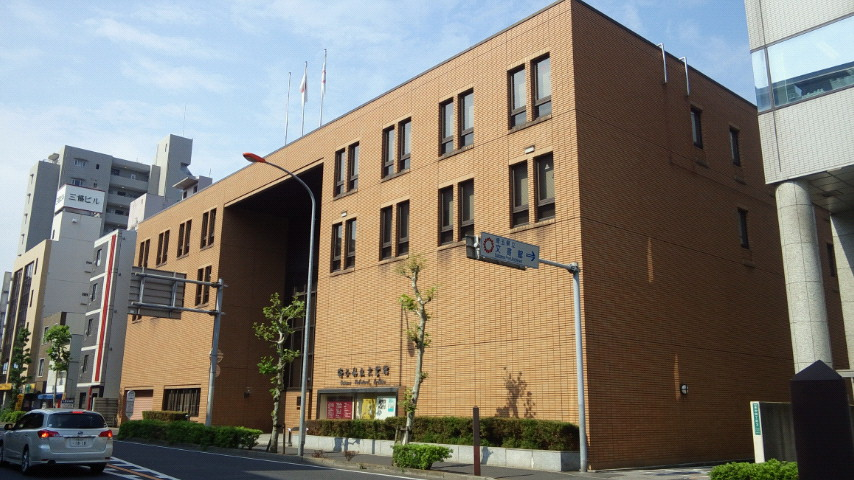 埼玉県立文書館